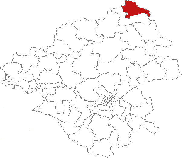 Carte de localisation du canton de Rougé (France, Loire-Atlantique)